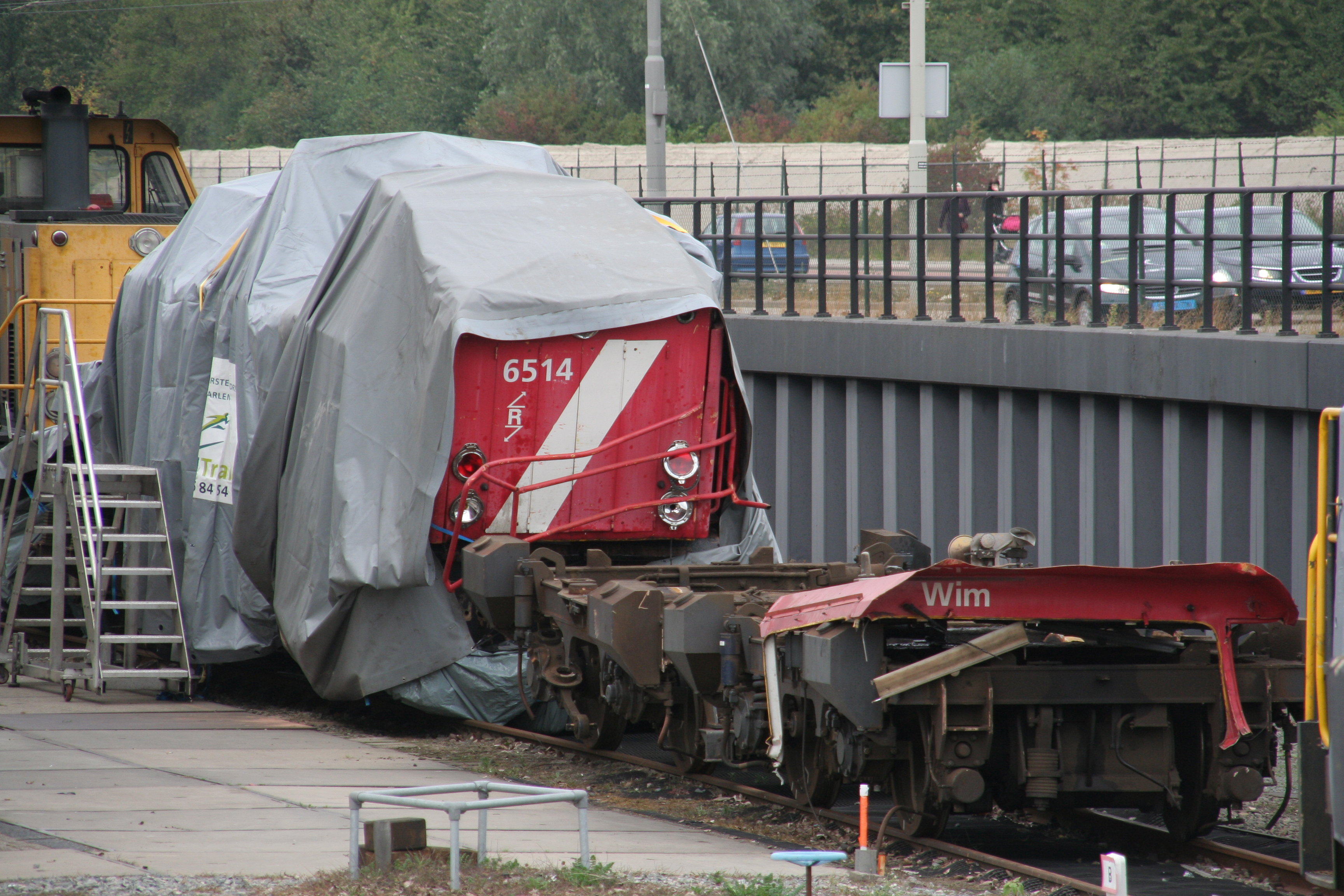 NS 6400 loc 6514. Wrakstukken na ongeval te Barendrecht. Hilledijk, Rotterdam.